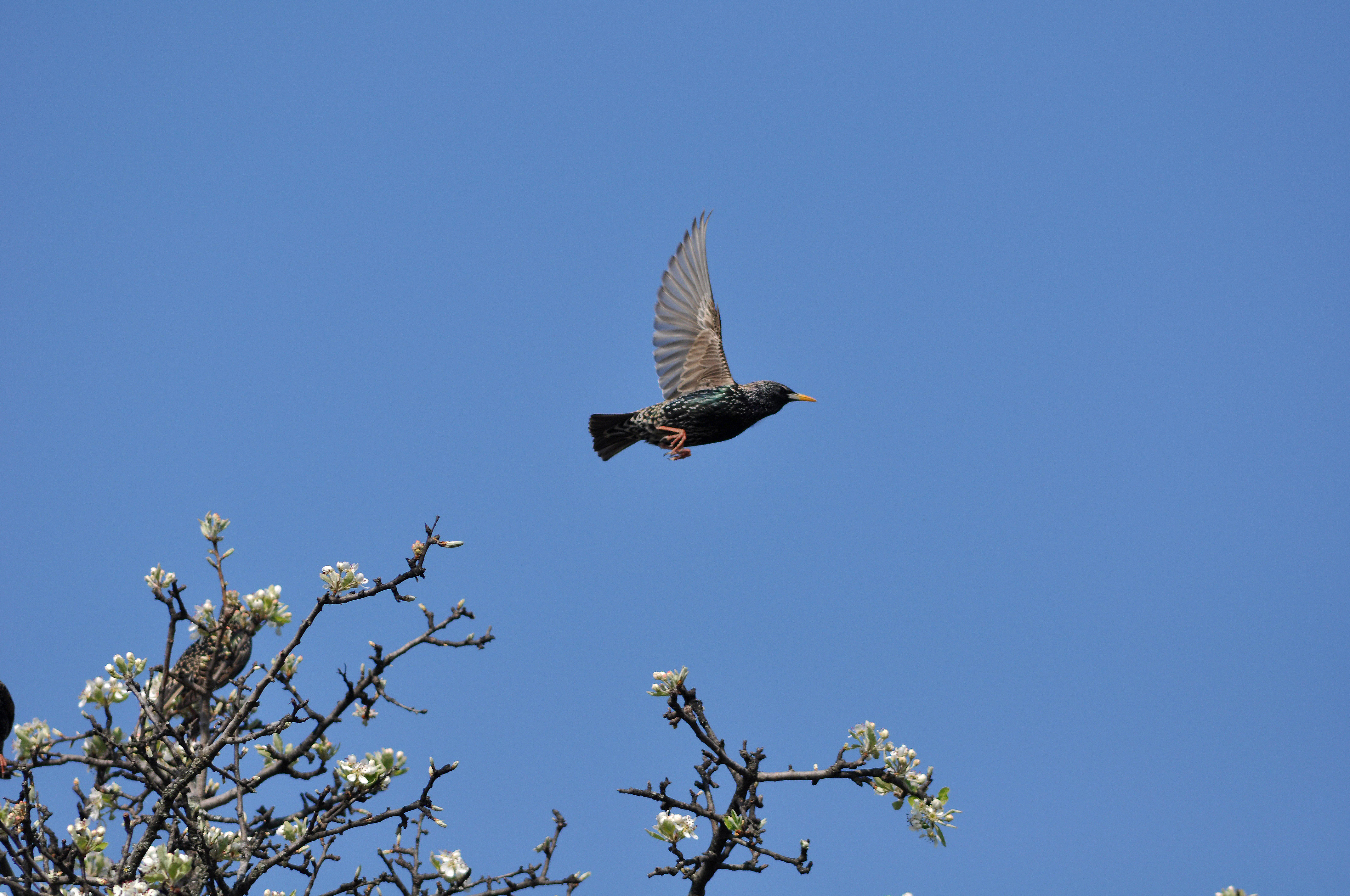 Un groupe d'étourneaux s'est posé dans le champ où paissent mes moutons. Un petit groupe d'oiseaux se trouve sur un arbre. Je photographie l'envol d'un étourneau.